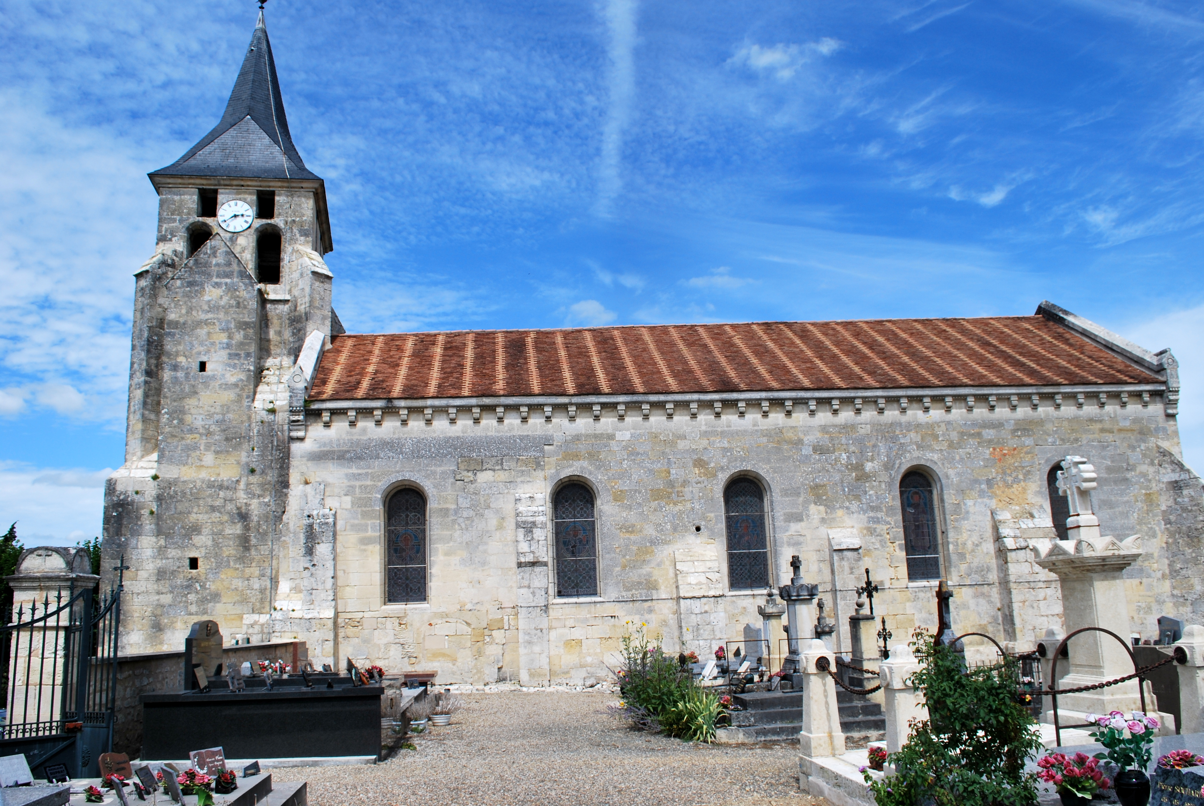 Pompignac église St Martin